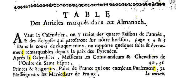 Exemple de coquilles typographiques dans la table des matières de l'Almanach royal de 1706, publié par Laurent d'Houry, imprimé par Jacques Vincent.